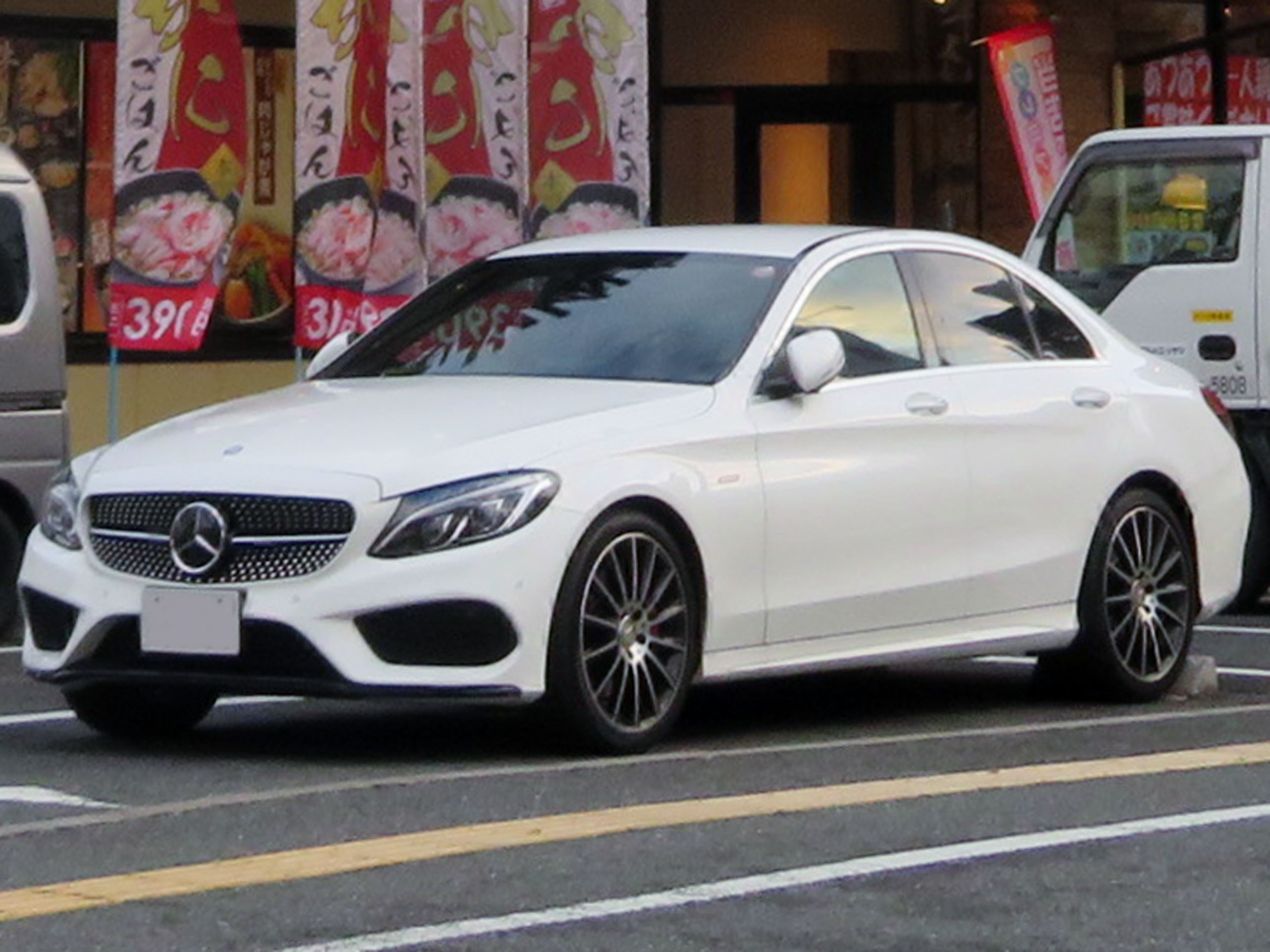 W205系メルセデス・ベンツ・C450 AMG 4MATICをフロントから撮影。